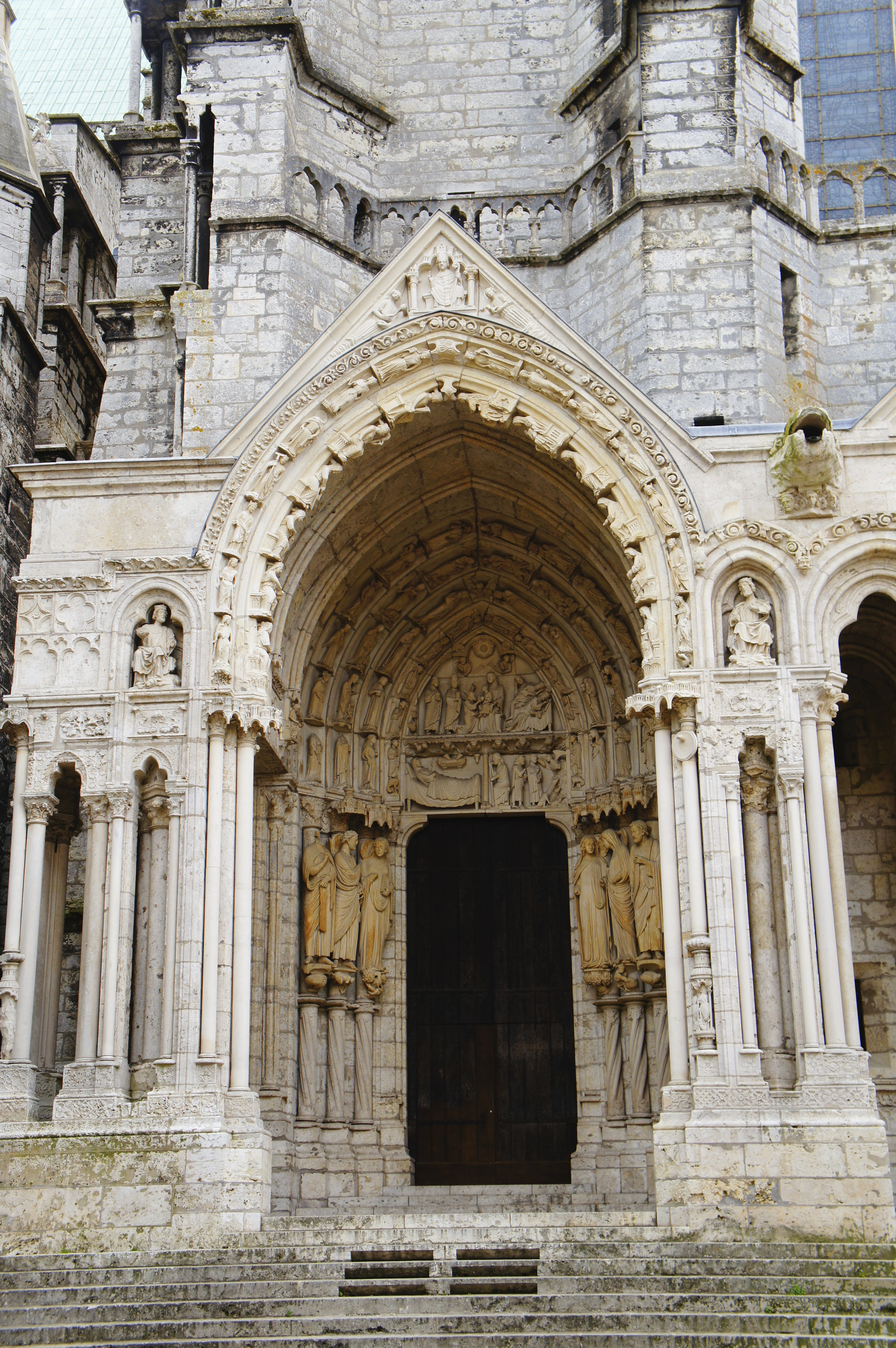 Cathédrale de Chartres Portail Nord